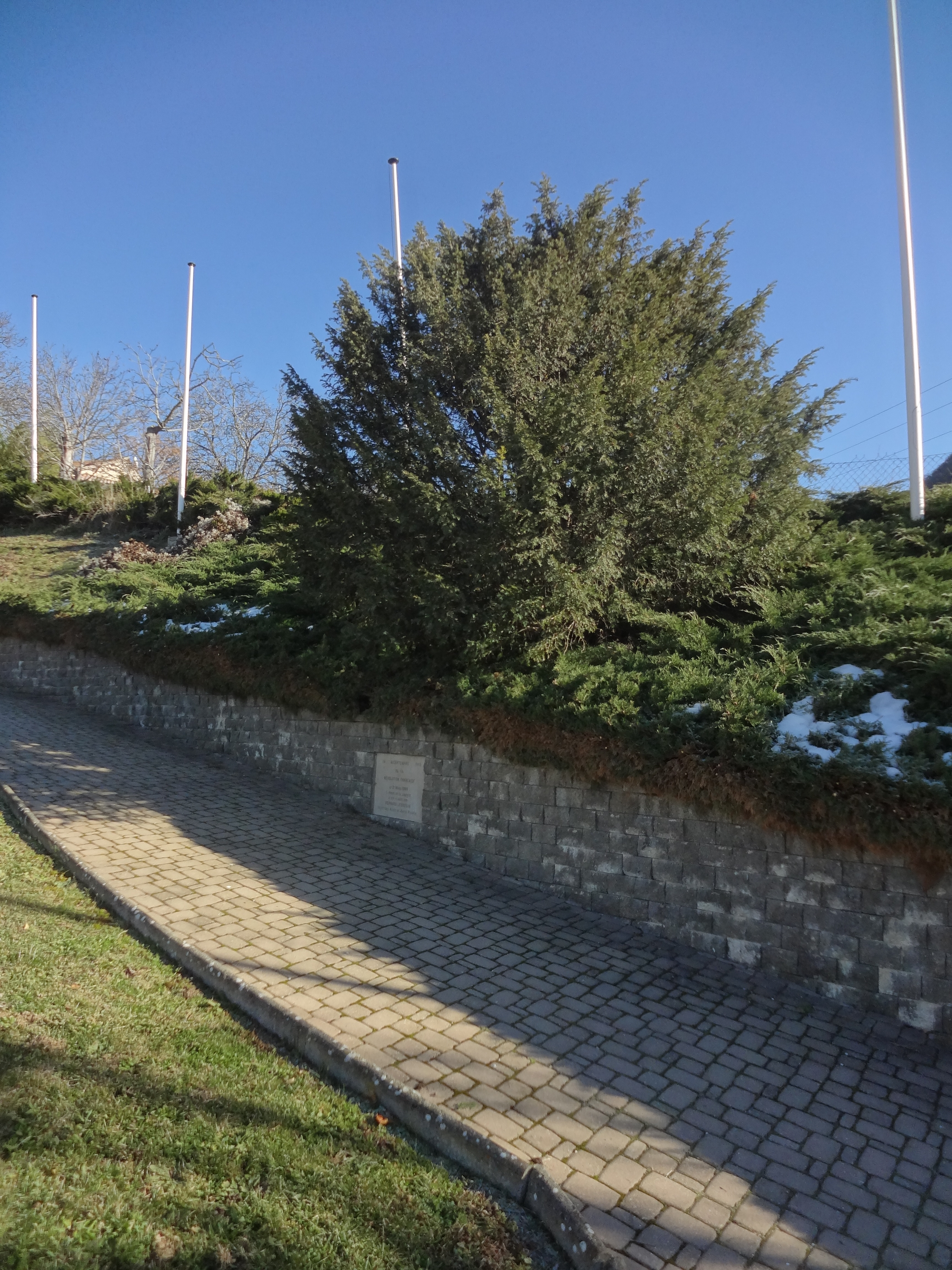 Planté en 1989